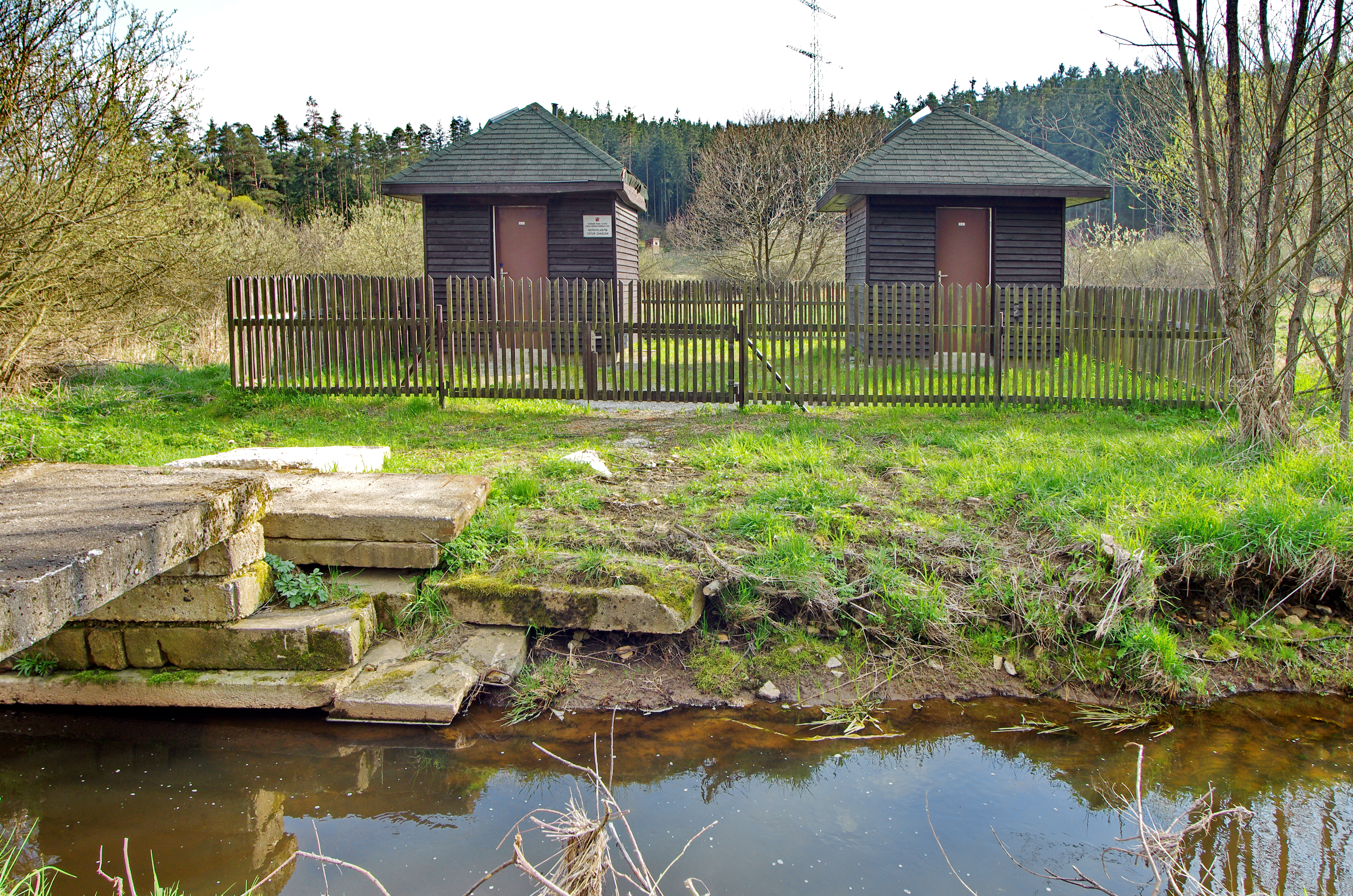 Pramenský potok čerpací vrty minerálky nedaleko soutoku s Mnichovským potokem, Slavkovský les, Mnichov, okres Cheb